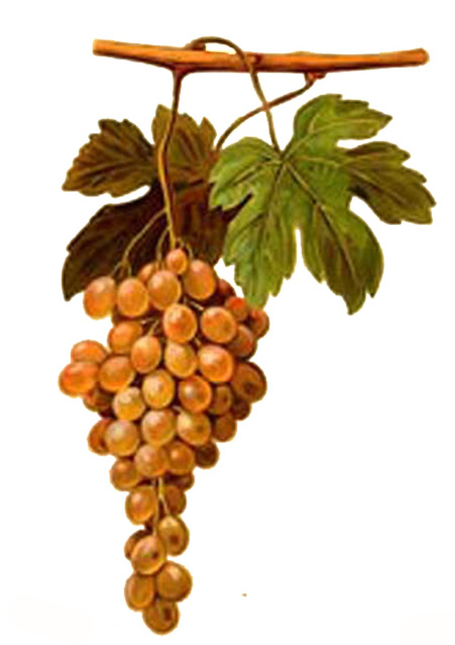 Grappe de Pedro-ximenes par Viala et Vermorel